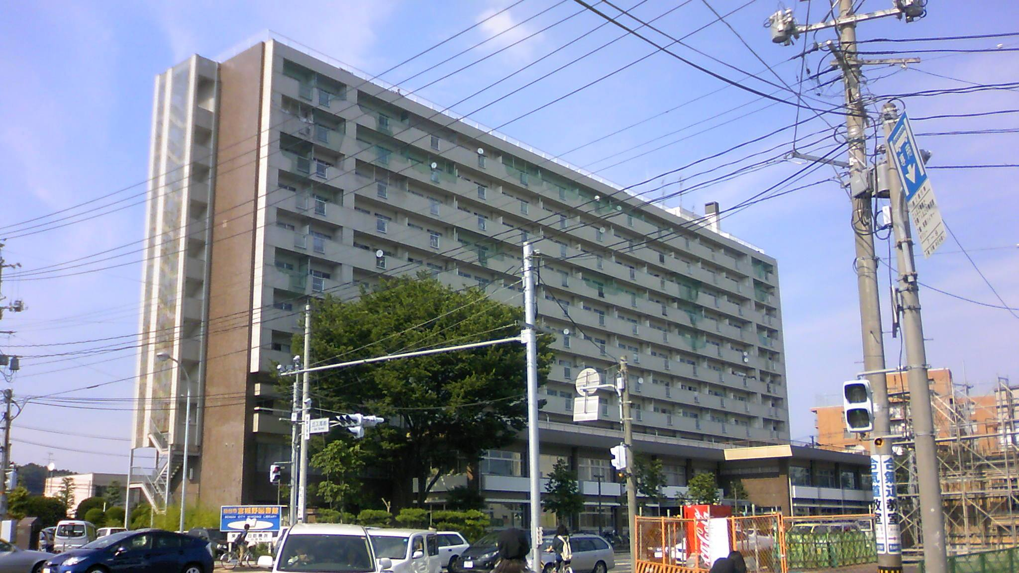 仙台市宮城野図書館